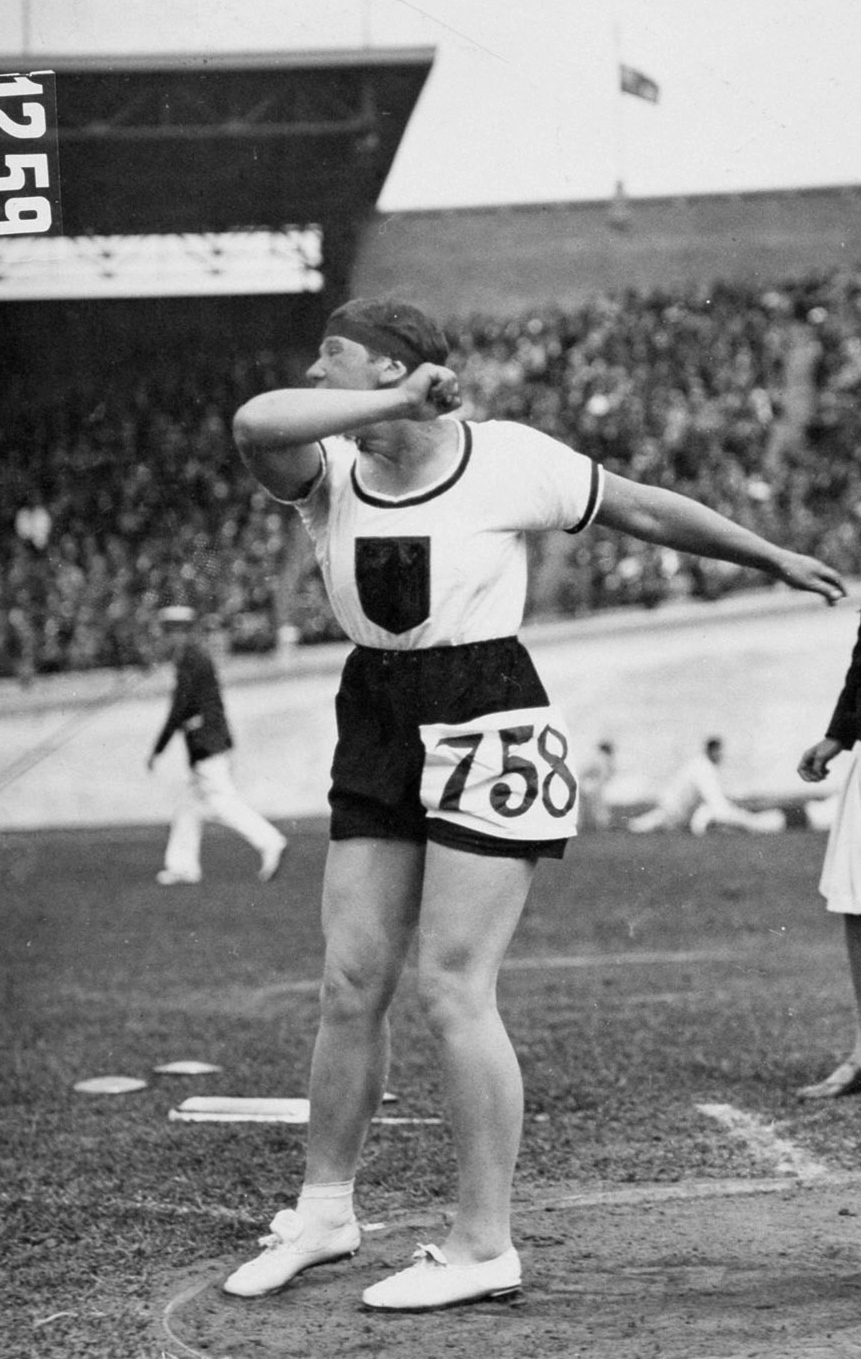 Olympische Spelen 1928 Amsterdam, Nederland. Discuswerpen dames. De Duitse Ch. Mader wierp haar discus 32.22 m.